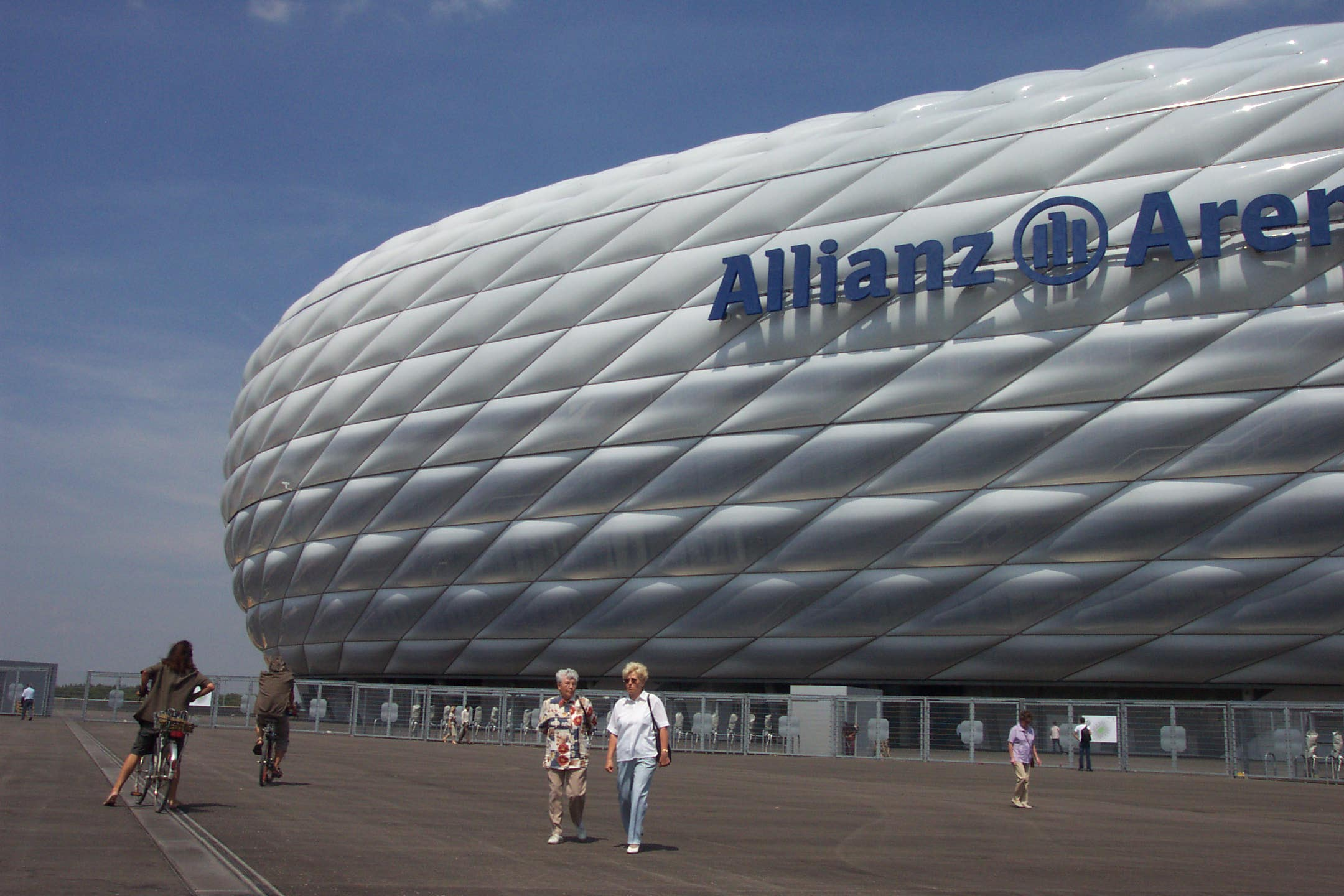 Allianz Arena München